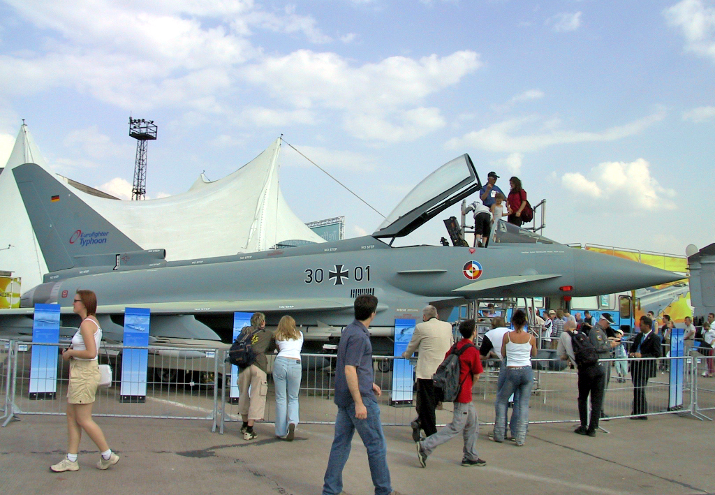 Ein Eurofighter der deutschen Luftwaffe auf der ILA 2002.